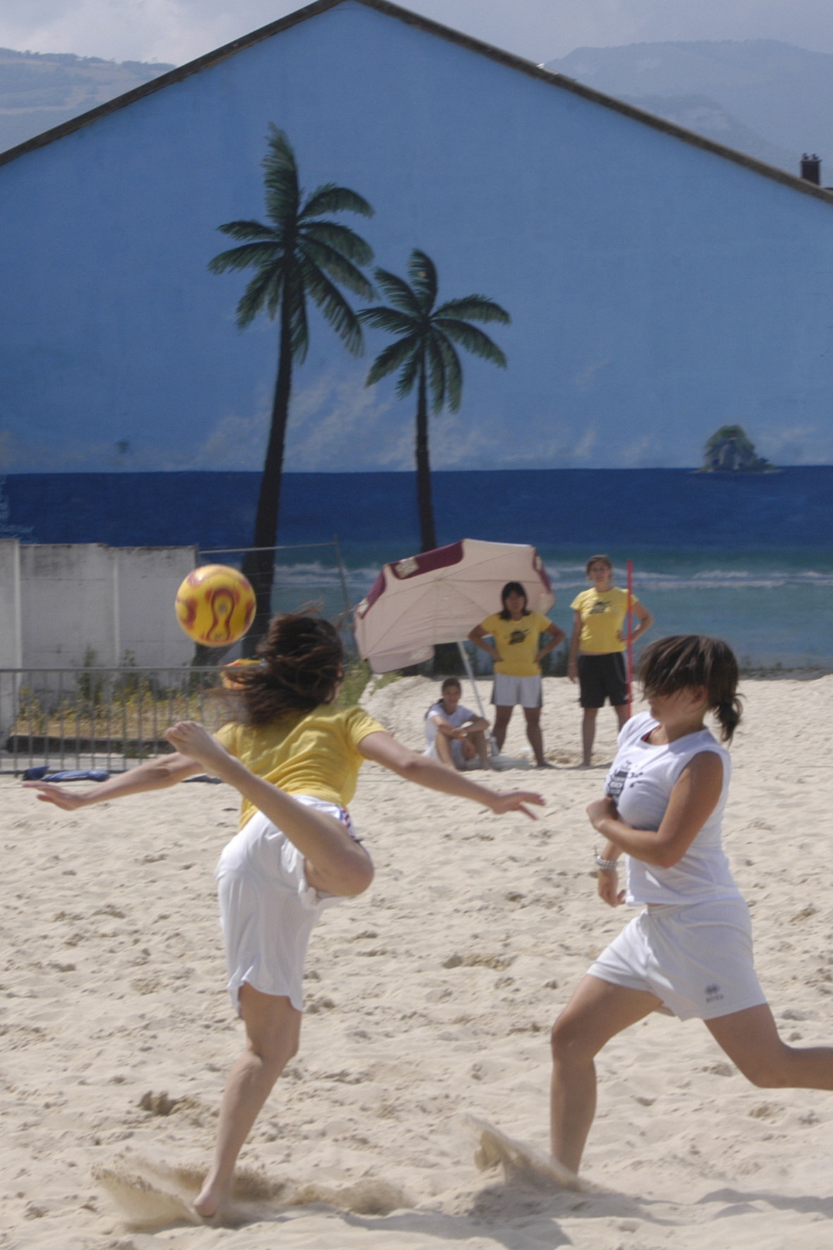 Femina Beach Soccer 2009 - Plage de Grenoble (38) (Isère, France) Tournoi de beach soccer 100% féminin créé et organisé par AD2S